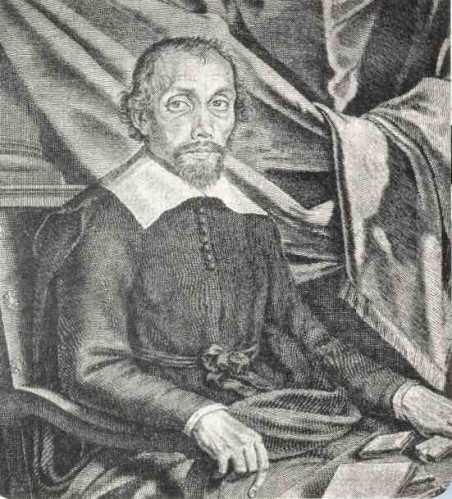 Renaudot, Théophraste (1586–1653), fondateur de la presse